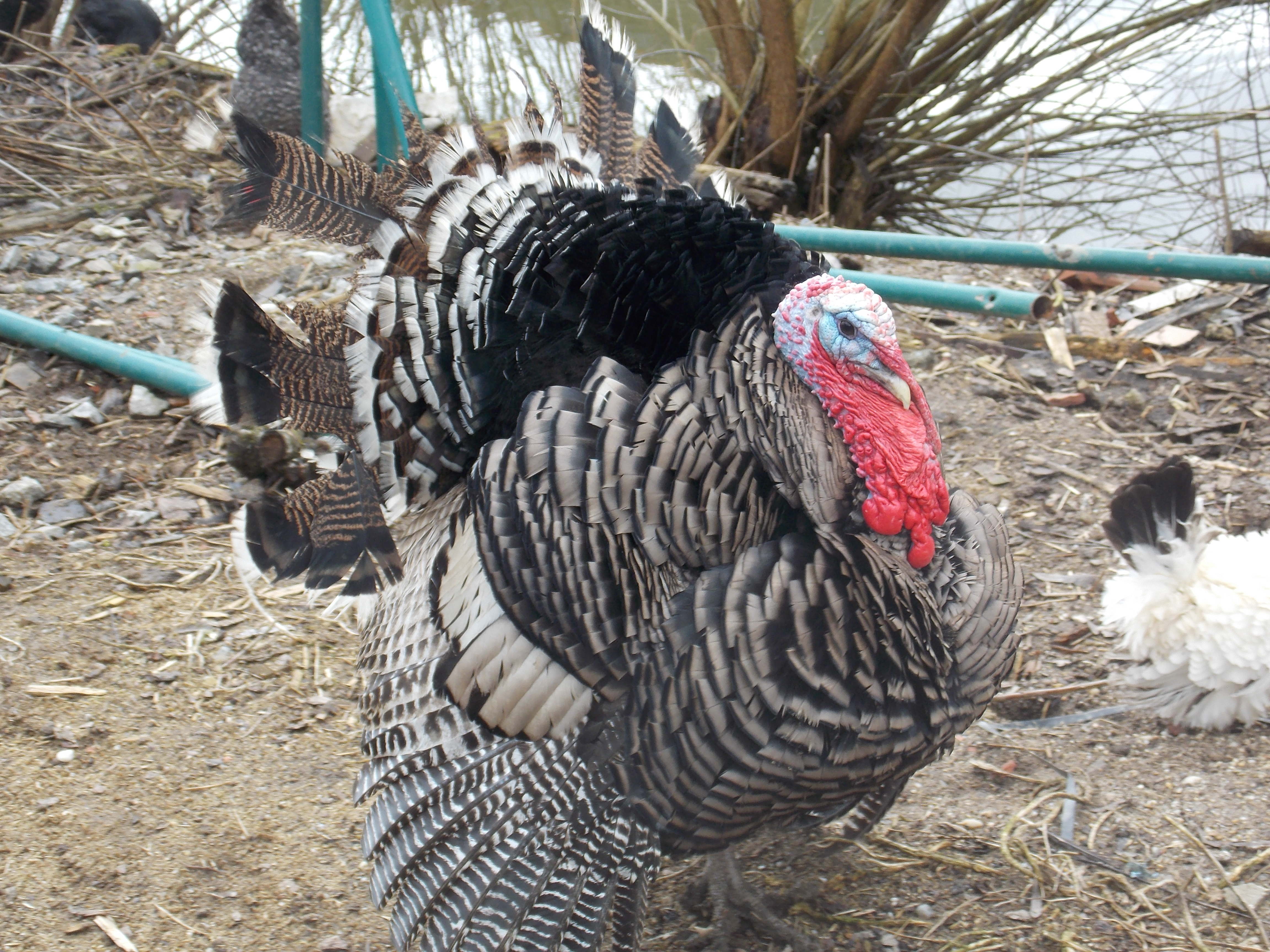 Männliche Narragansettpute